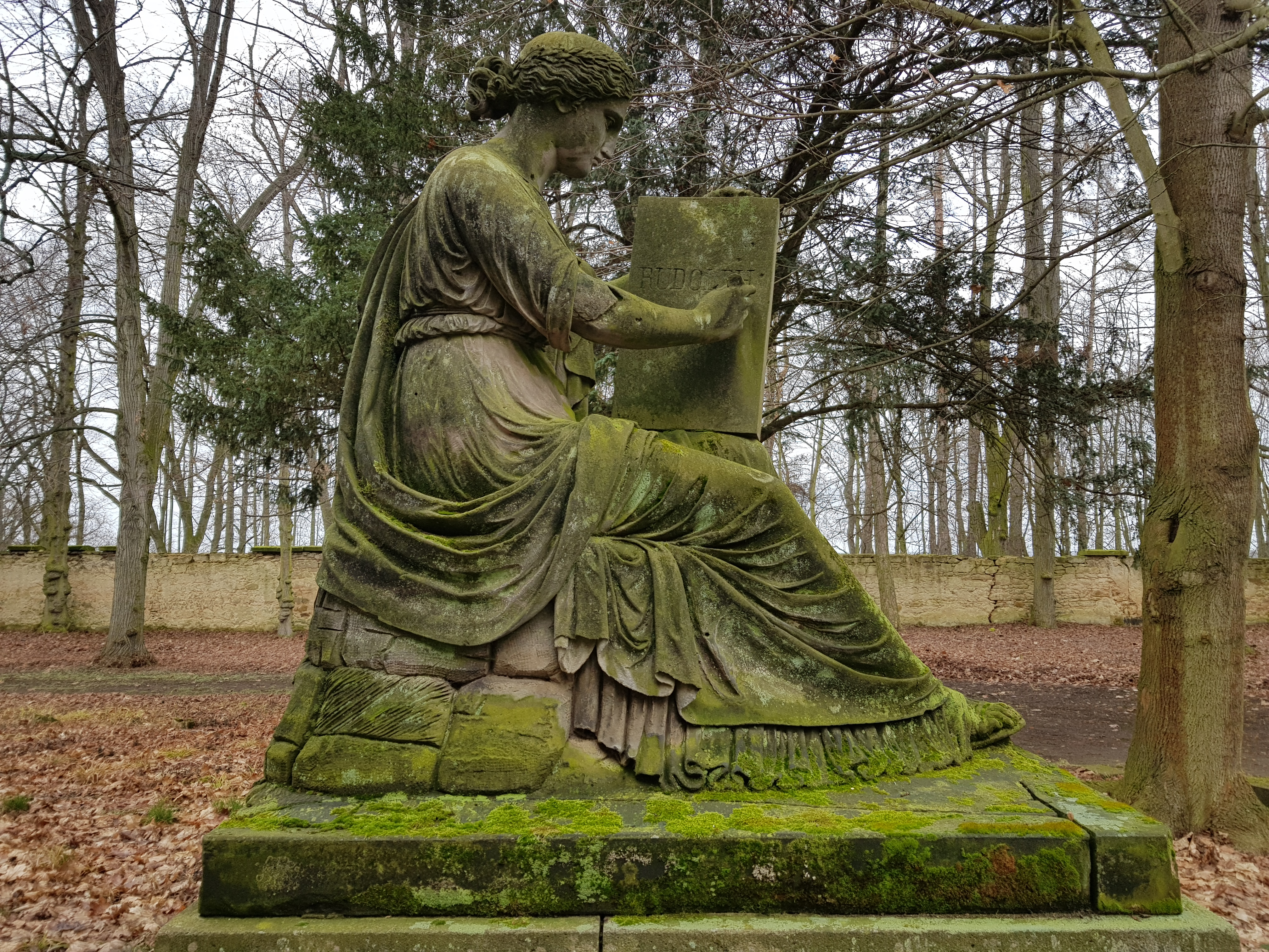 Hrobka Kinských v Budenicích